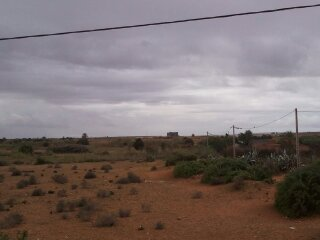 داخل دوار ايت بايه